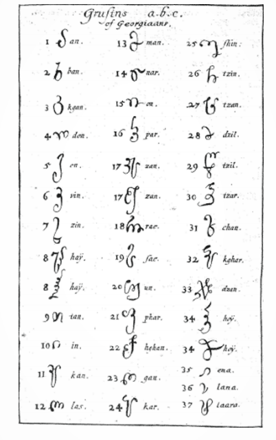 Georgian printed alphabet, Nicolaes Witsen, "Noord en Oost Tartarye" ("North and East Tartary"), script: "Grusinian or Georgian a.b.c.", In 1692 between PP. 316-317 Part II. In 1705 and 1785 on P. 507.